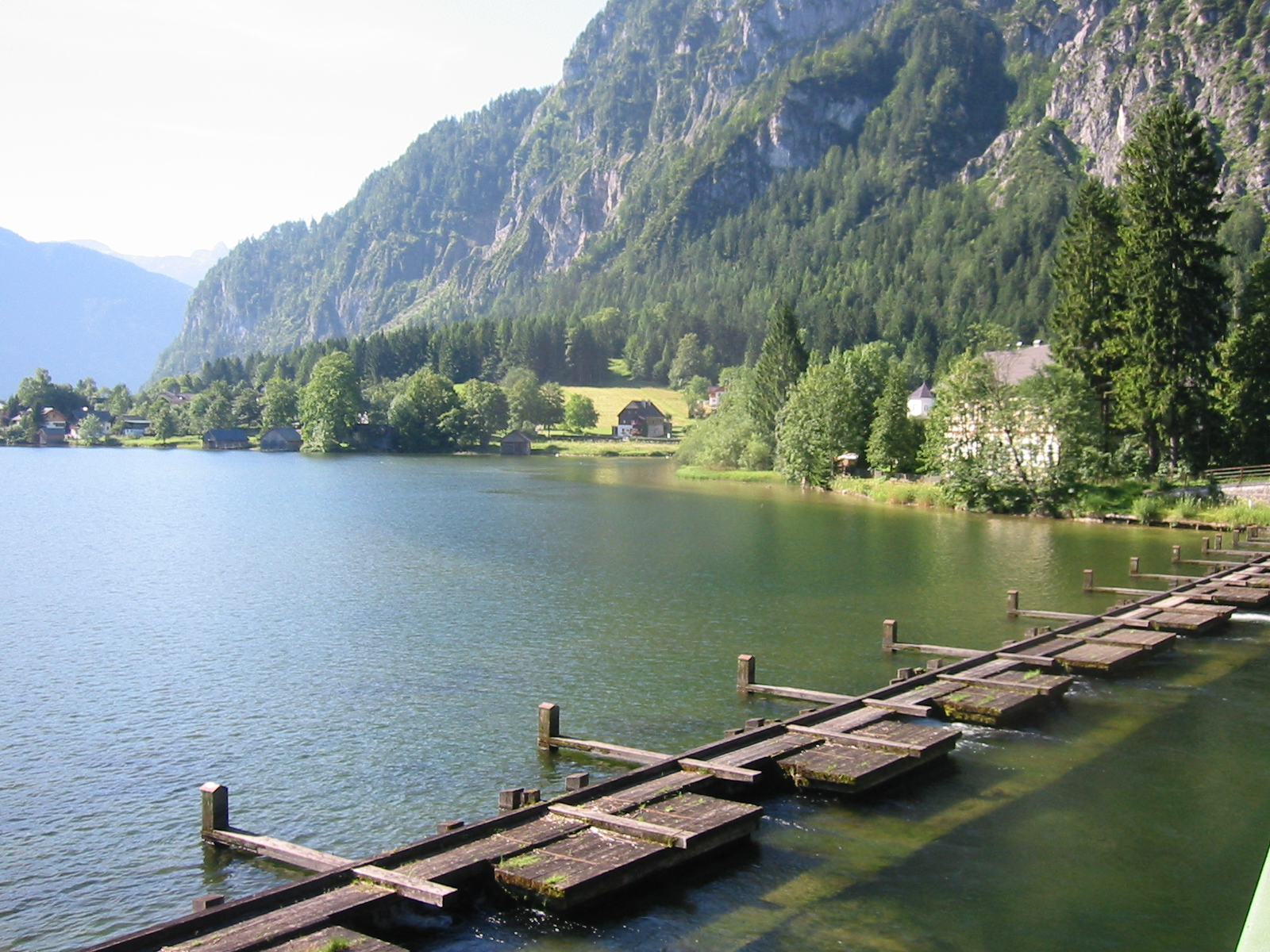 Steeger Seeklause